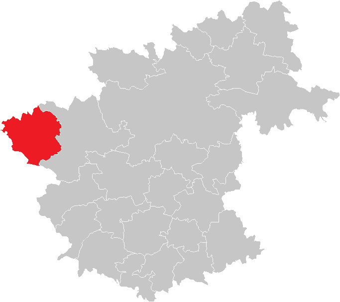 Bezirk Zwettl